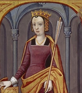 Ops. Miniature extraite de la collection De mulieribus claris de Boccace.